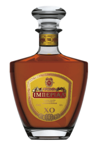 коньяк Империал. Таврия 2010